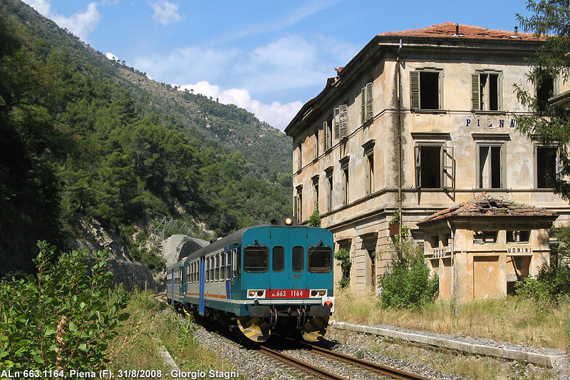 Ex stazione ferroviaria di Piena. In transito un treno di automotrici ALn 663.